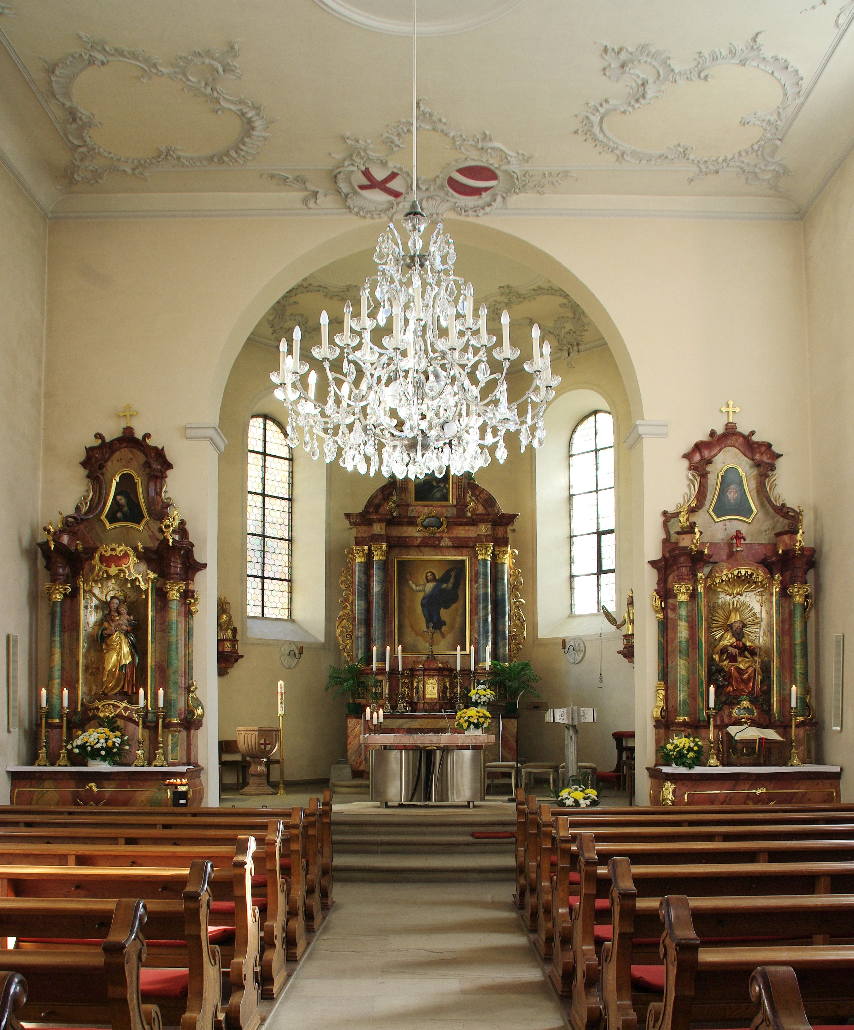 St. Cyriak und Perpetua ist eine kleine Kirche auf dem Annaplatz in Freiburg, deswegen wird sie auch das Anna-Kirchle genannt; Blick auf die Altäre; am Chorbogen Stadtwappen Freiburg und österreichisches Wappen